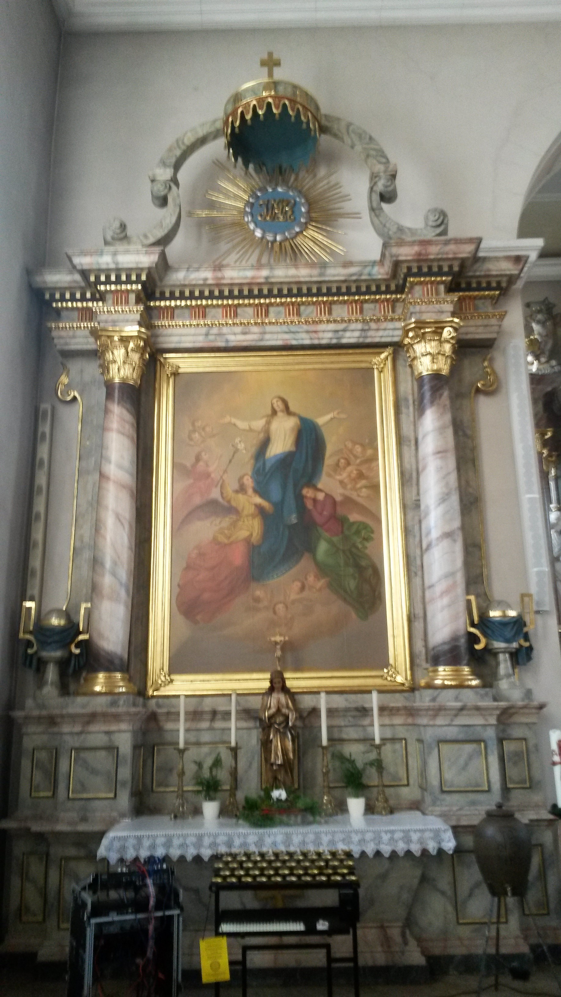 Der linke Seitenaltar der St. Markus Kirche in Unterbalbach